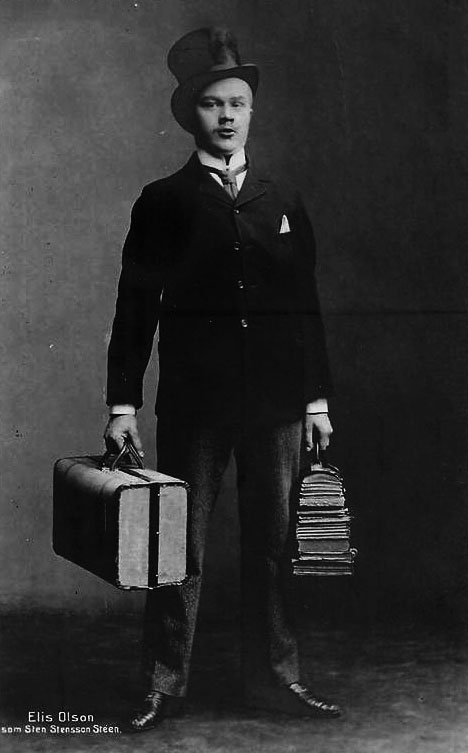 Elis Ellis